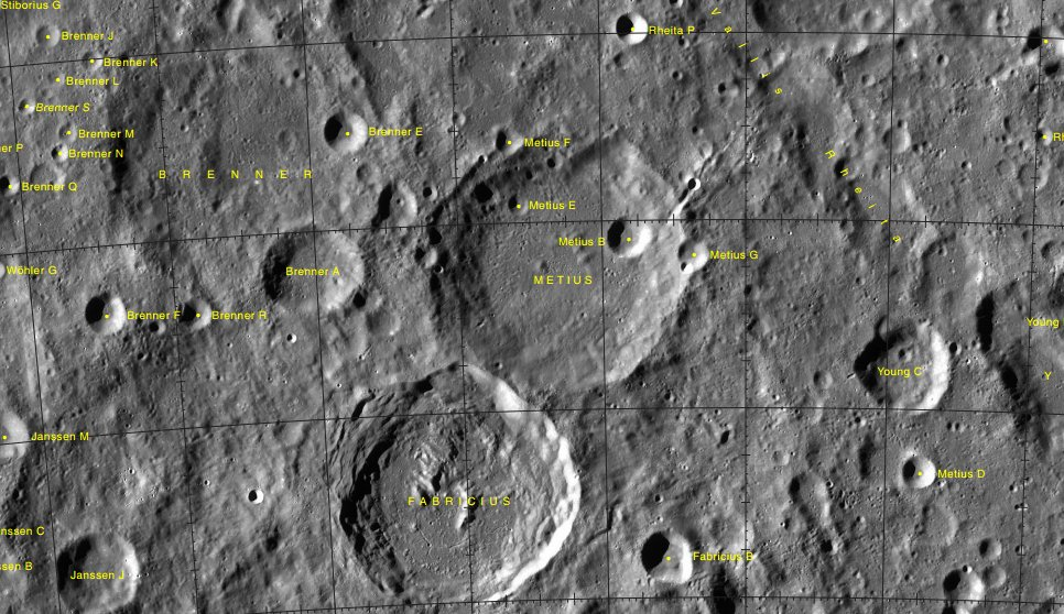 Cráter lunar Metius. Localización. (Imagen LRO)